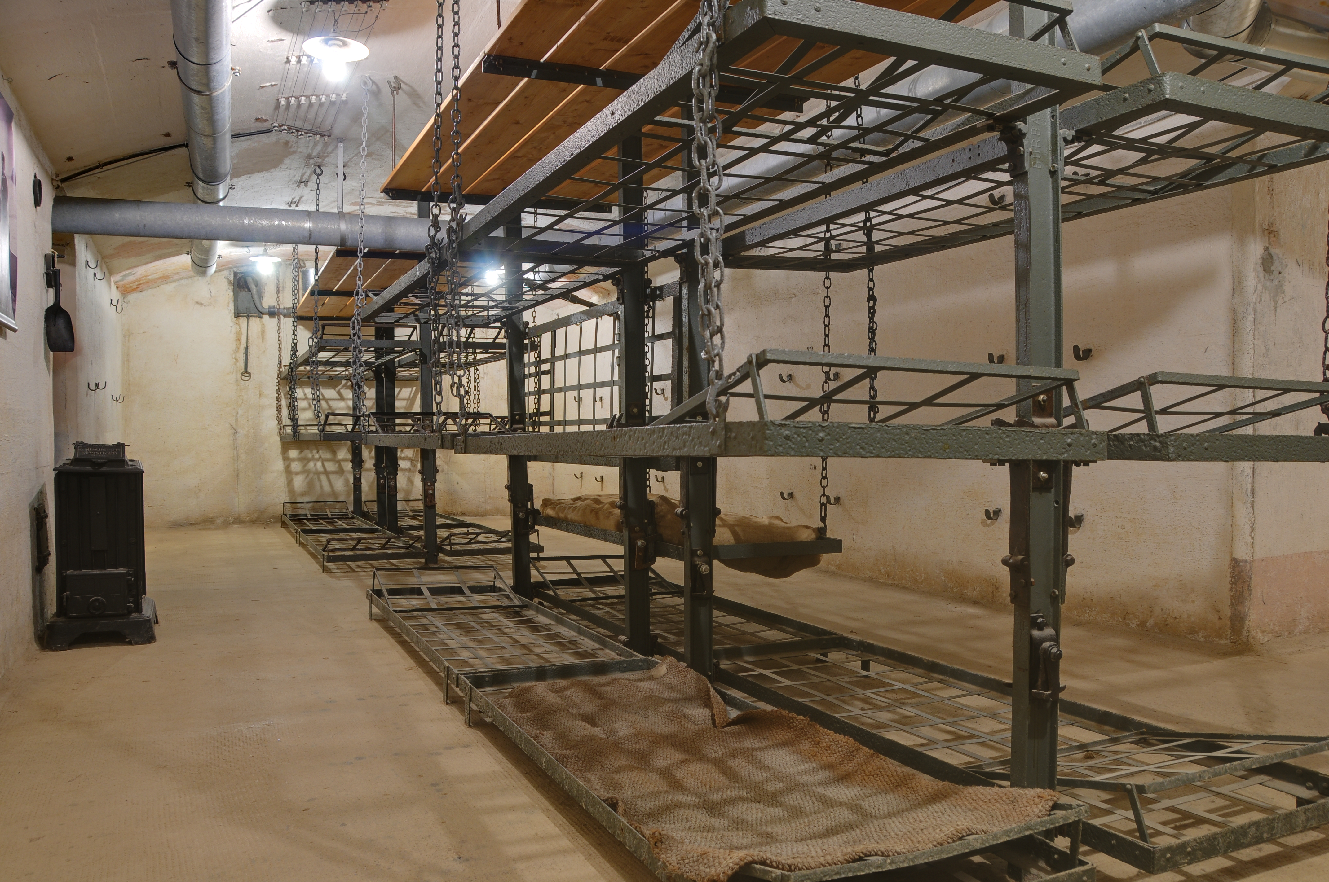 Une chambrée. Feste Kaiser Wilhelm II (HDR).